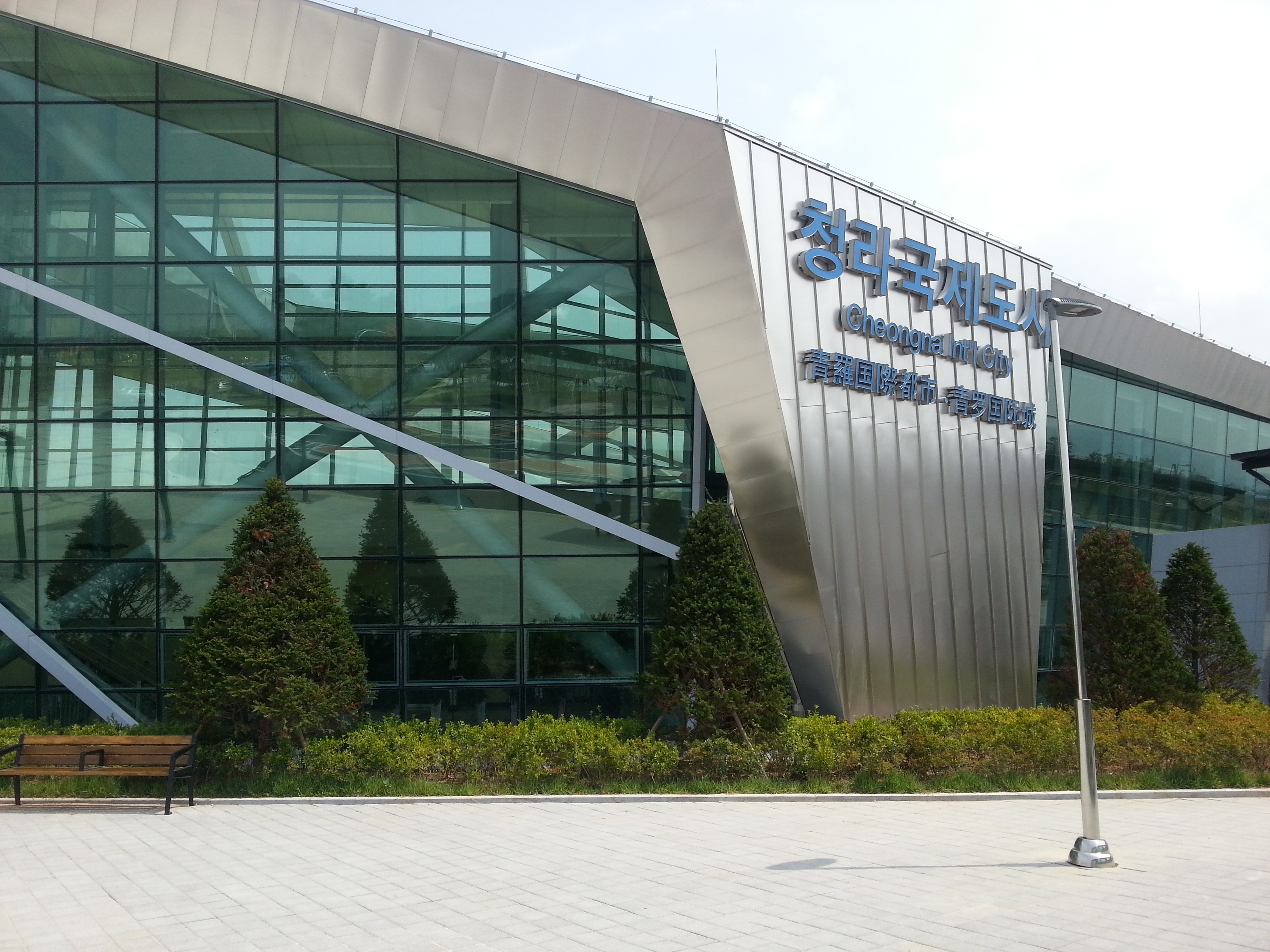 인천국제공항철도 청라국제도시역 역사